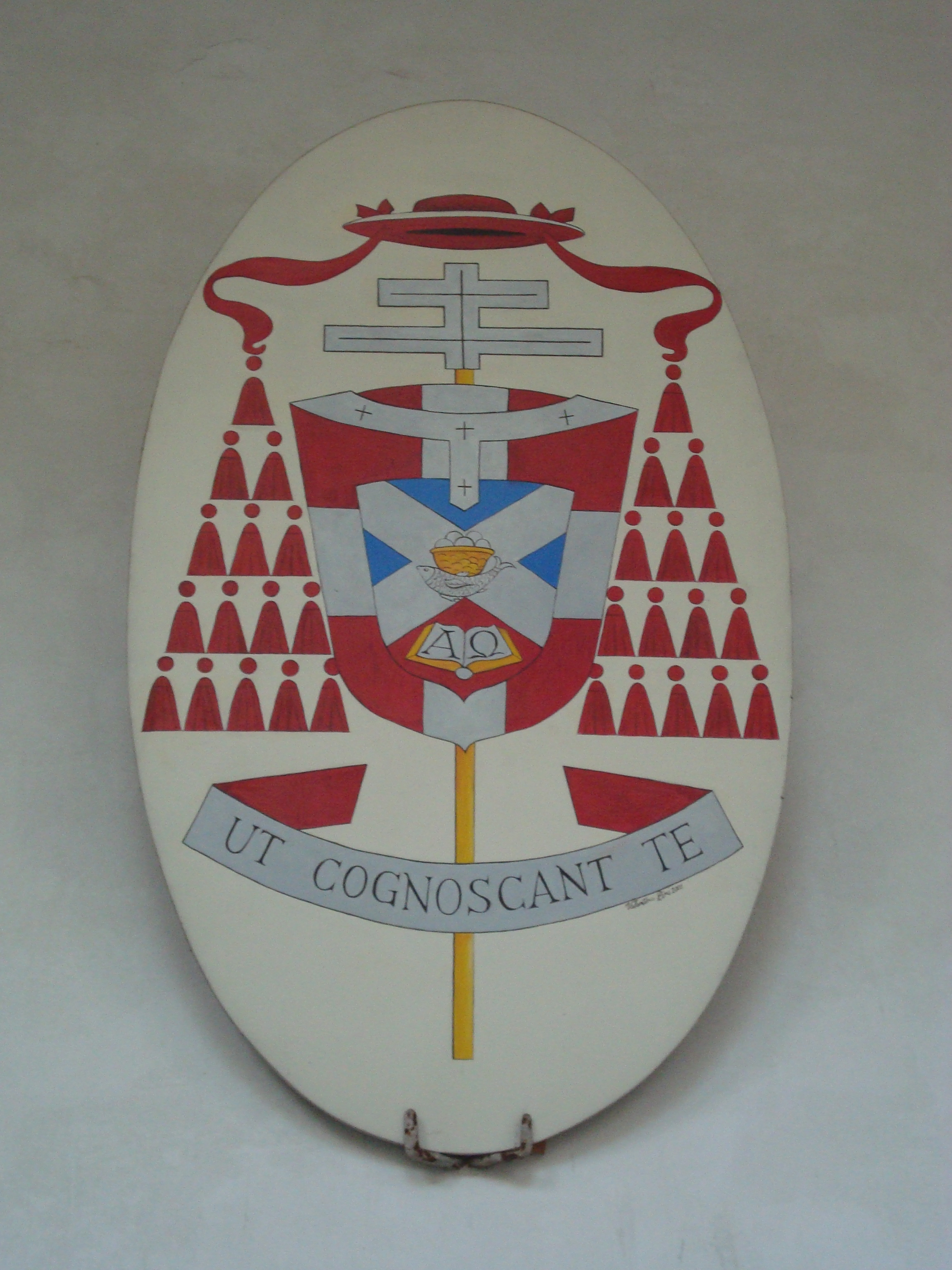 Blason du cardinal Adrianus Simonis sur la façade de la basilique Basilica di San Clemente al Laterano à Rome